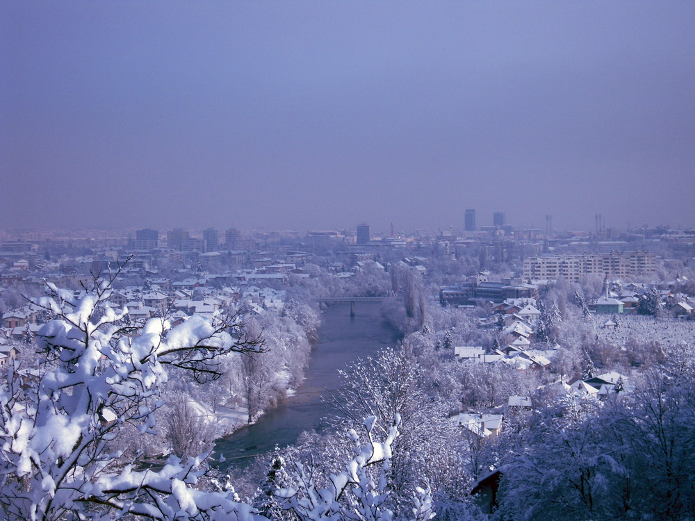 Панорама Бањалуке